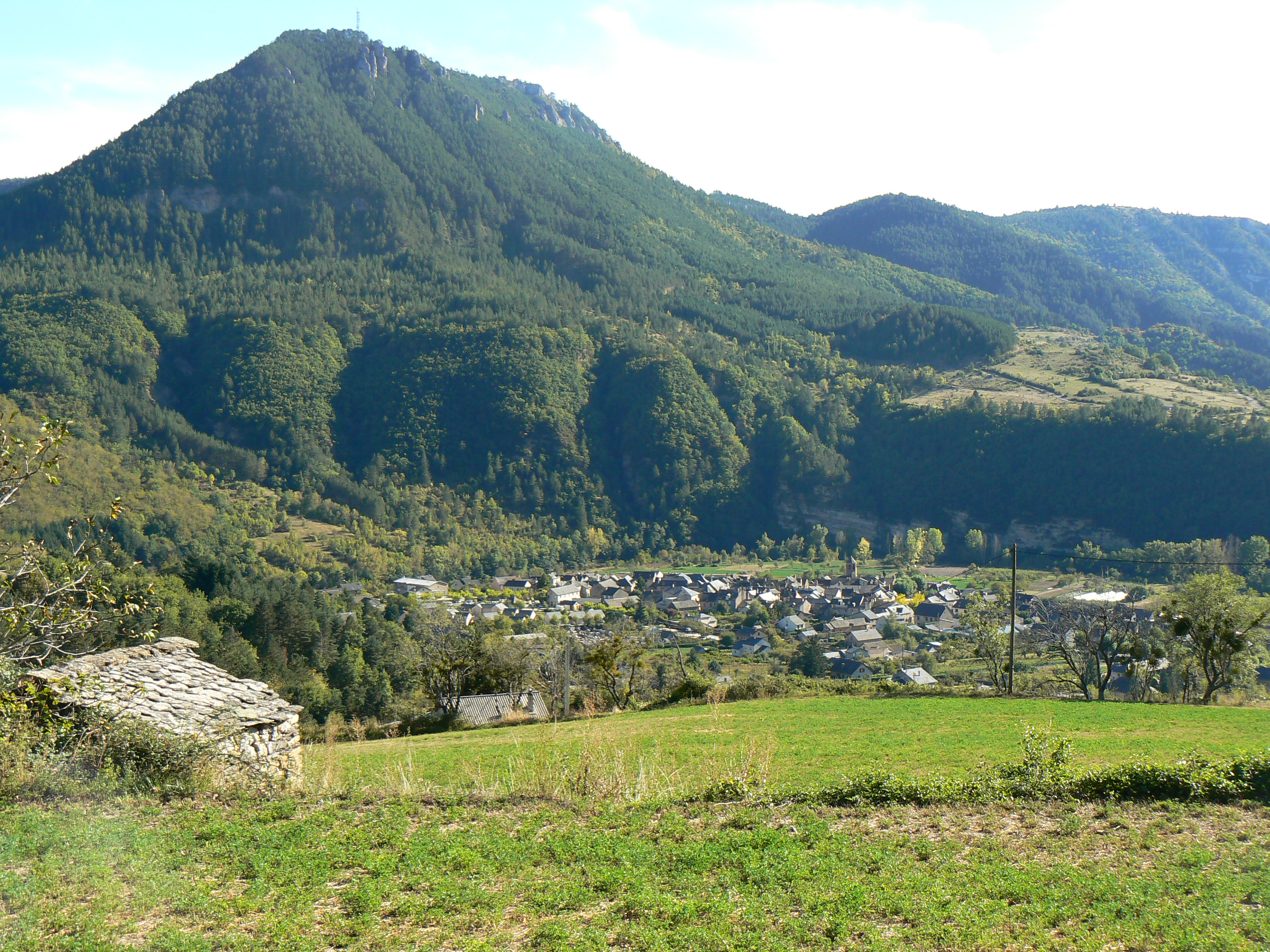 Vue générale de la commune d'Ispagnac en Lozère